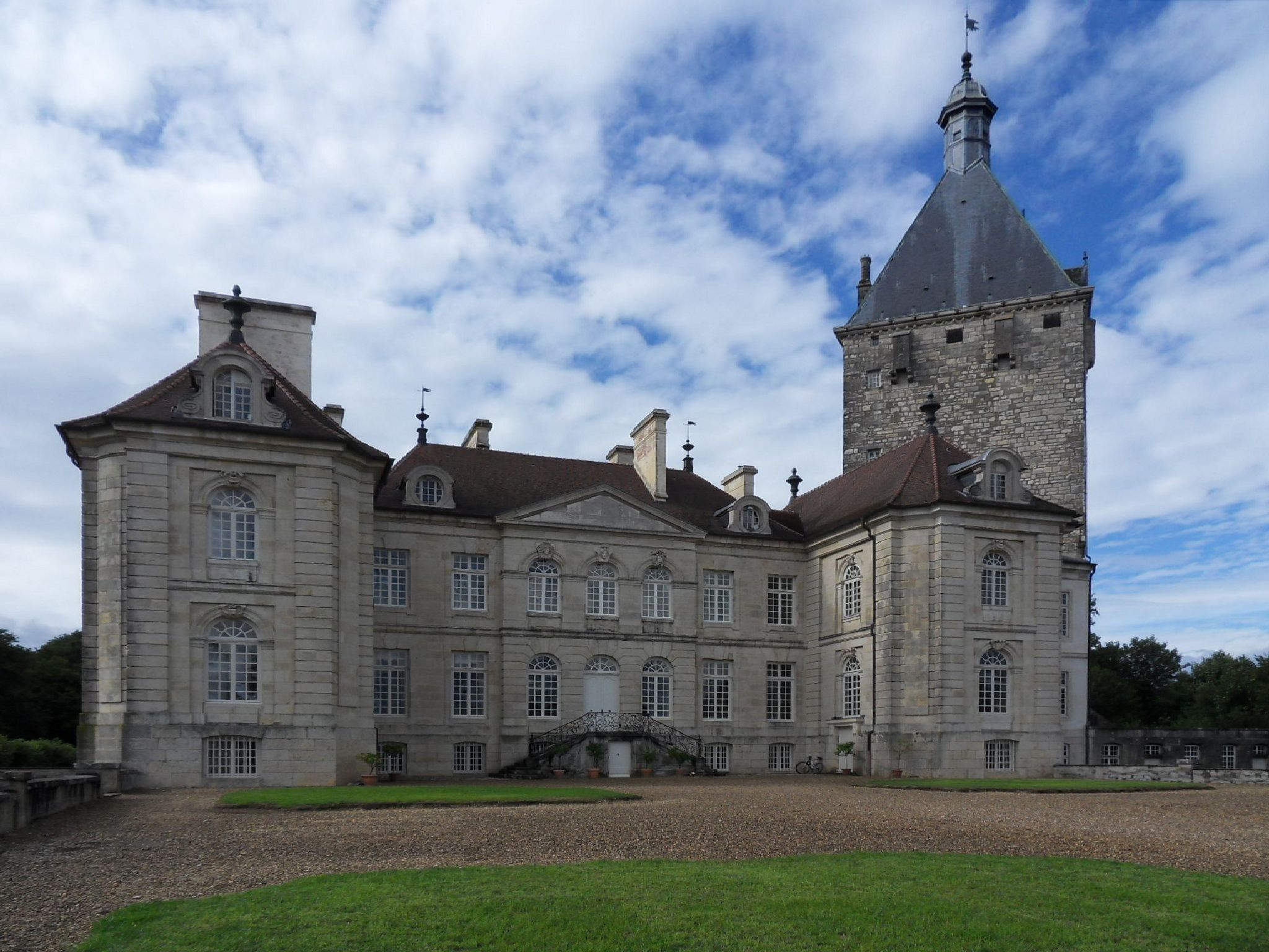 Vue sur le château de Talmay (Côte-d'Or, Bourgogne), (XVIII siècle) avec donjon du XIII siècle